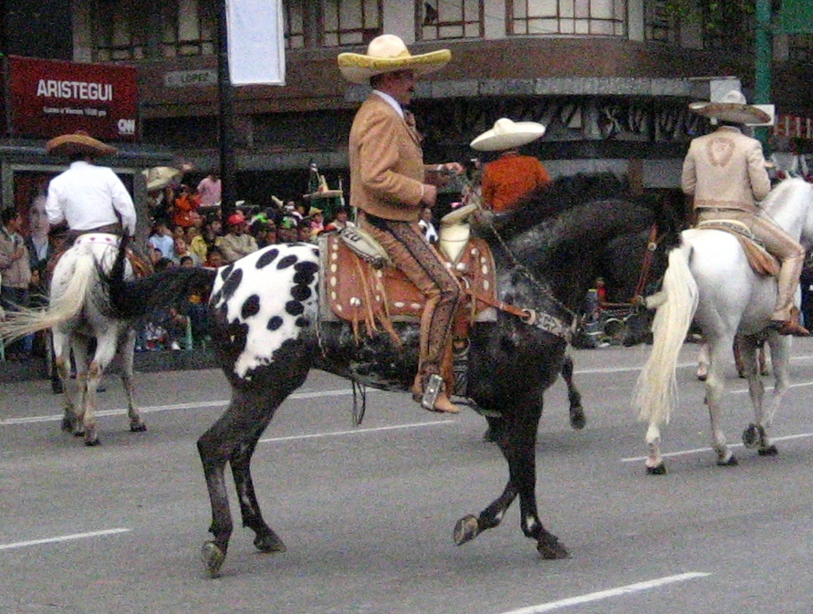 charros mexiko 16 septiembre 2009